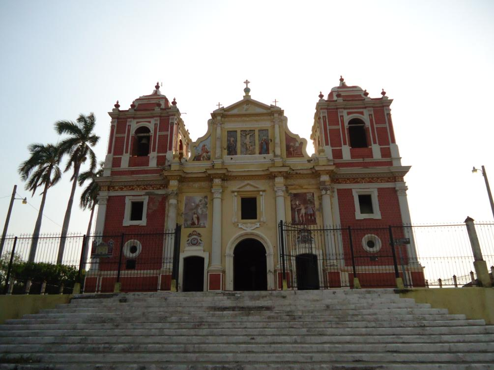 El Calvario León, Nicaragua por Richard Weiss